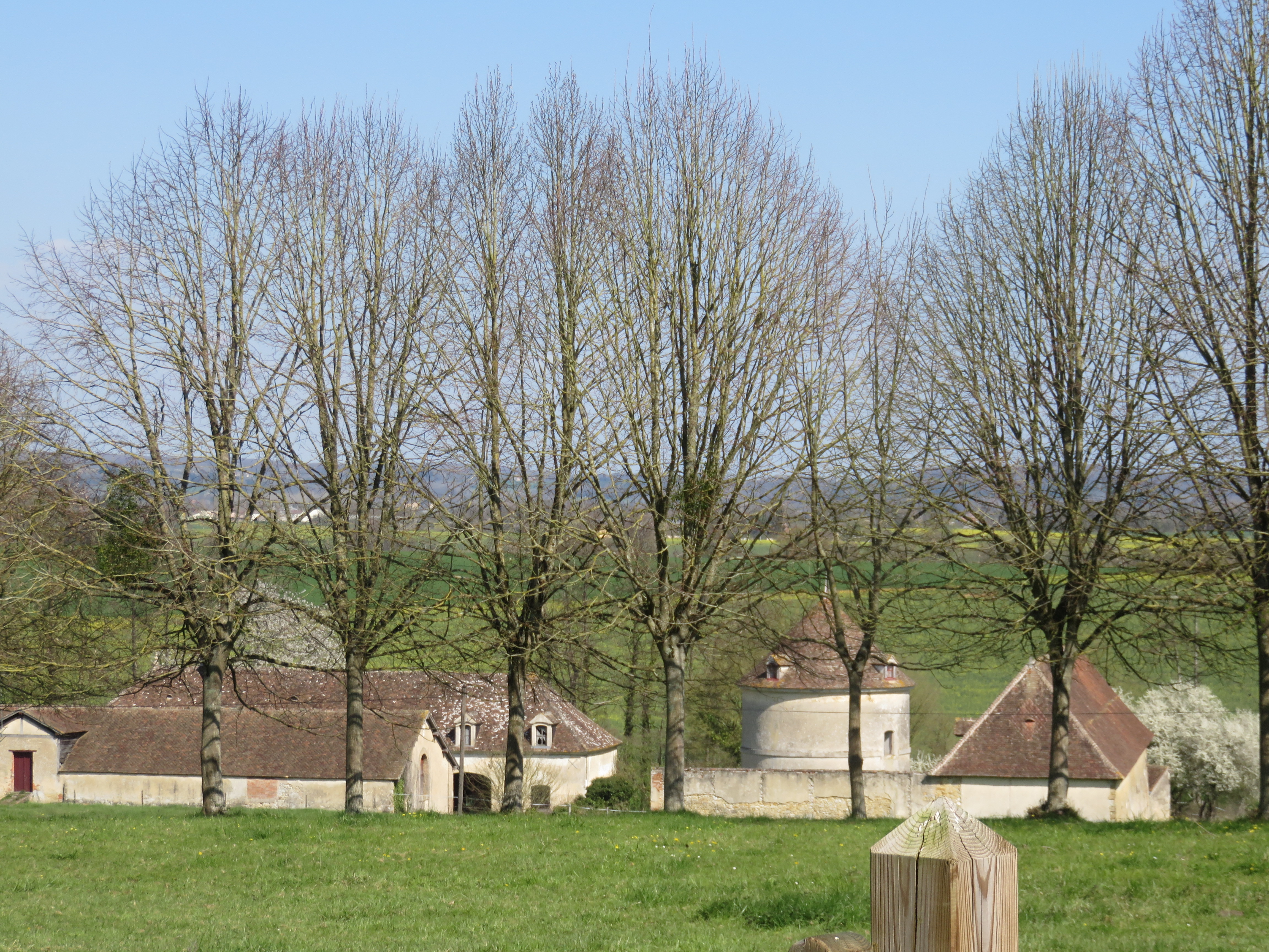 Château de Chèreperrine dans l'Orne (XVIIIe siècle) la basse-cour avec son colombier